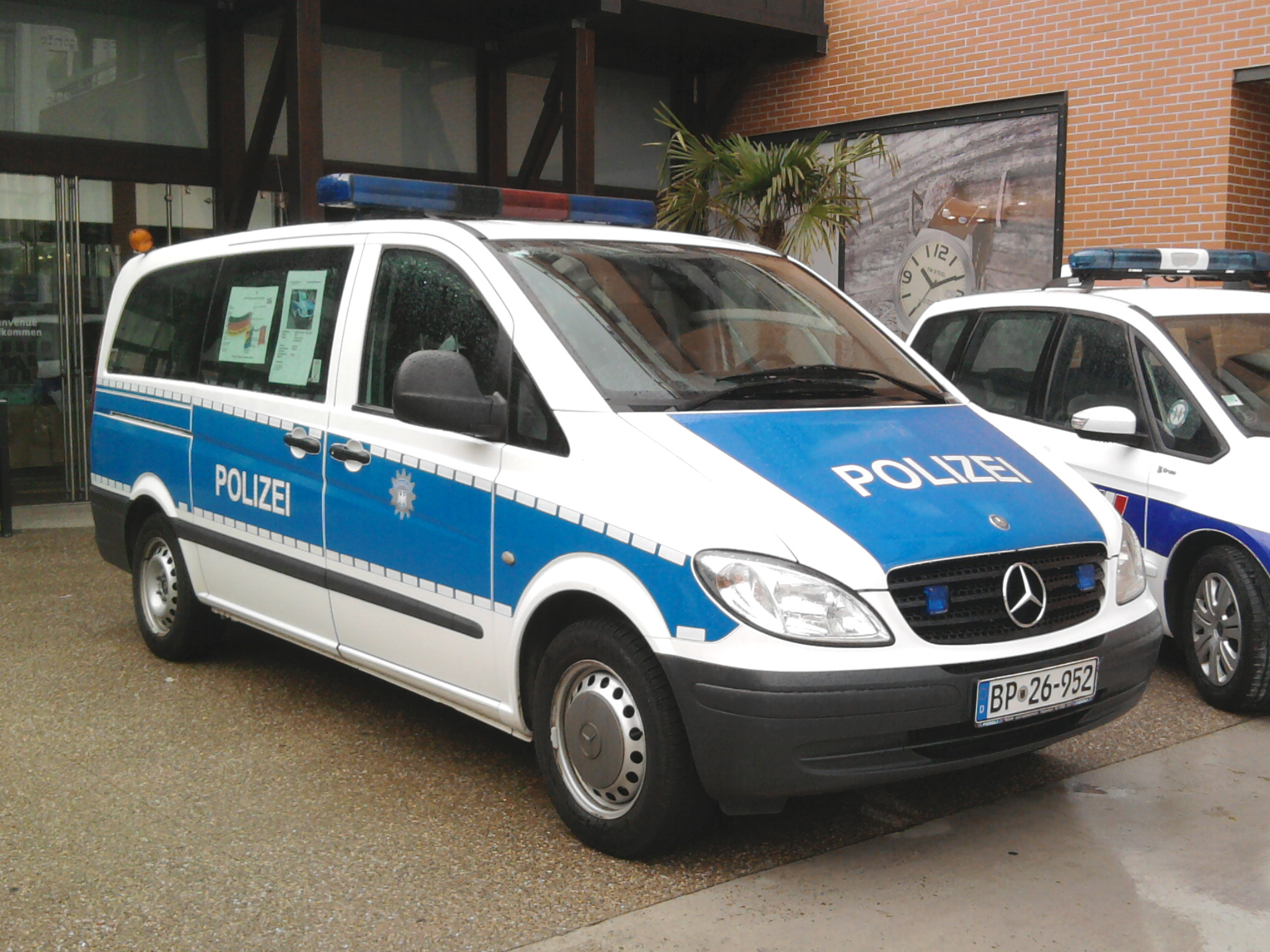 Mercedes-Benz Vito de la Bundespolizei servant aux frontières, à Strasbourg